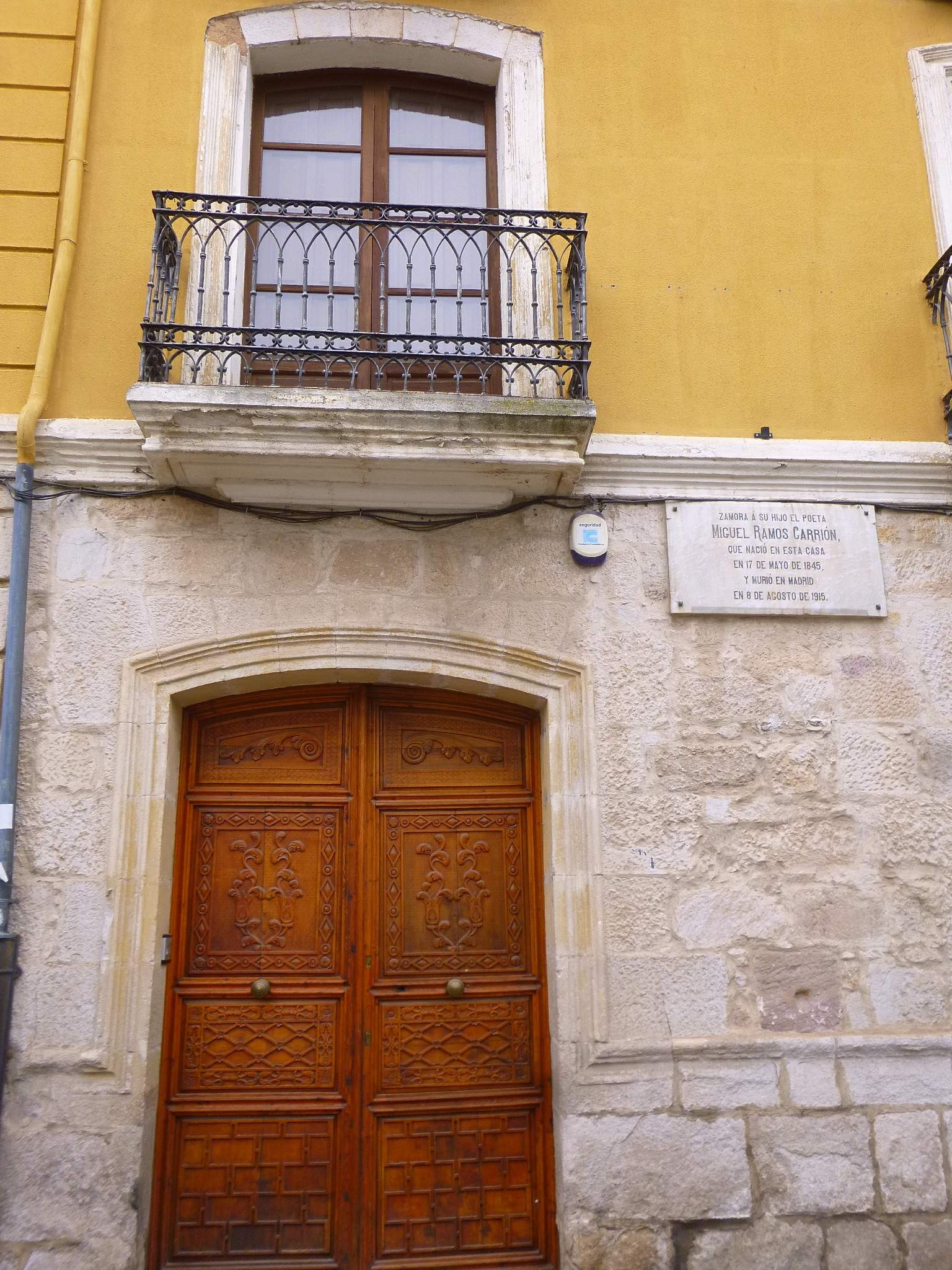 Zamora - Casa natal del poeta Miguel Ramos Carrión (1845-1915) en la calle de Zamora que lleva su nombre